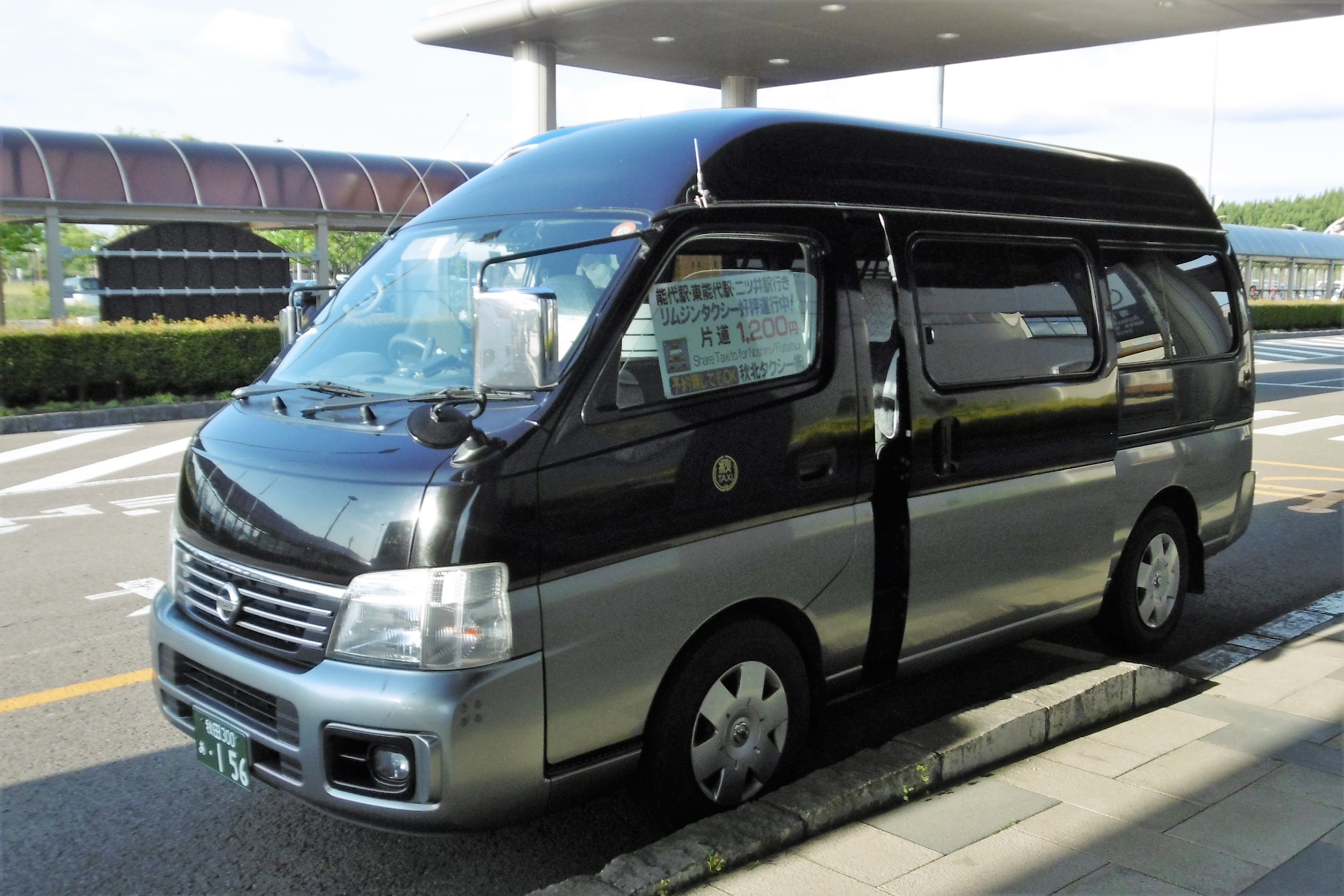 空港型乗合タクシー 能代線（秋北タクシー）